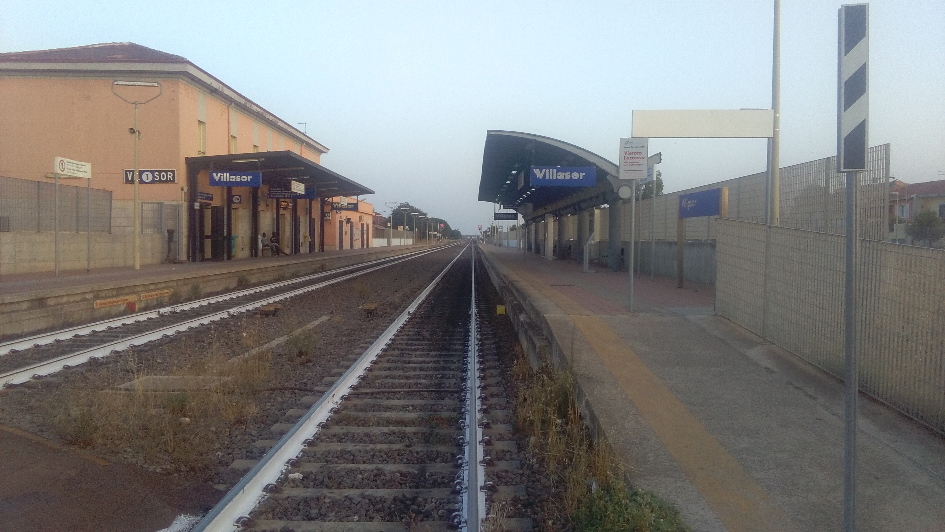 Stazione di Villasor con i 2 rispettivi binari